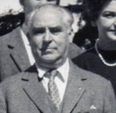 Francisco Enrique Urondo